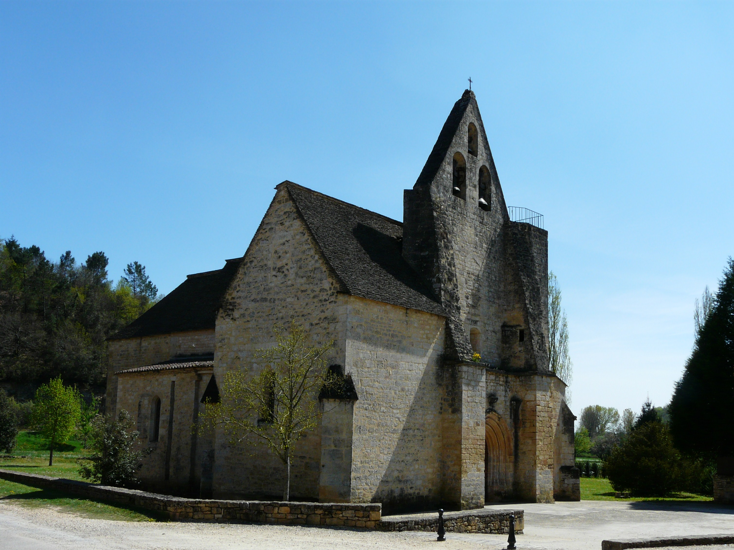 L'église Sainte-Nathalène vue du nord, Sainte-Nathalène, Dordogne, France